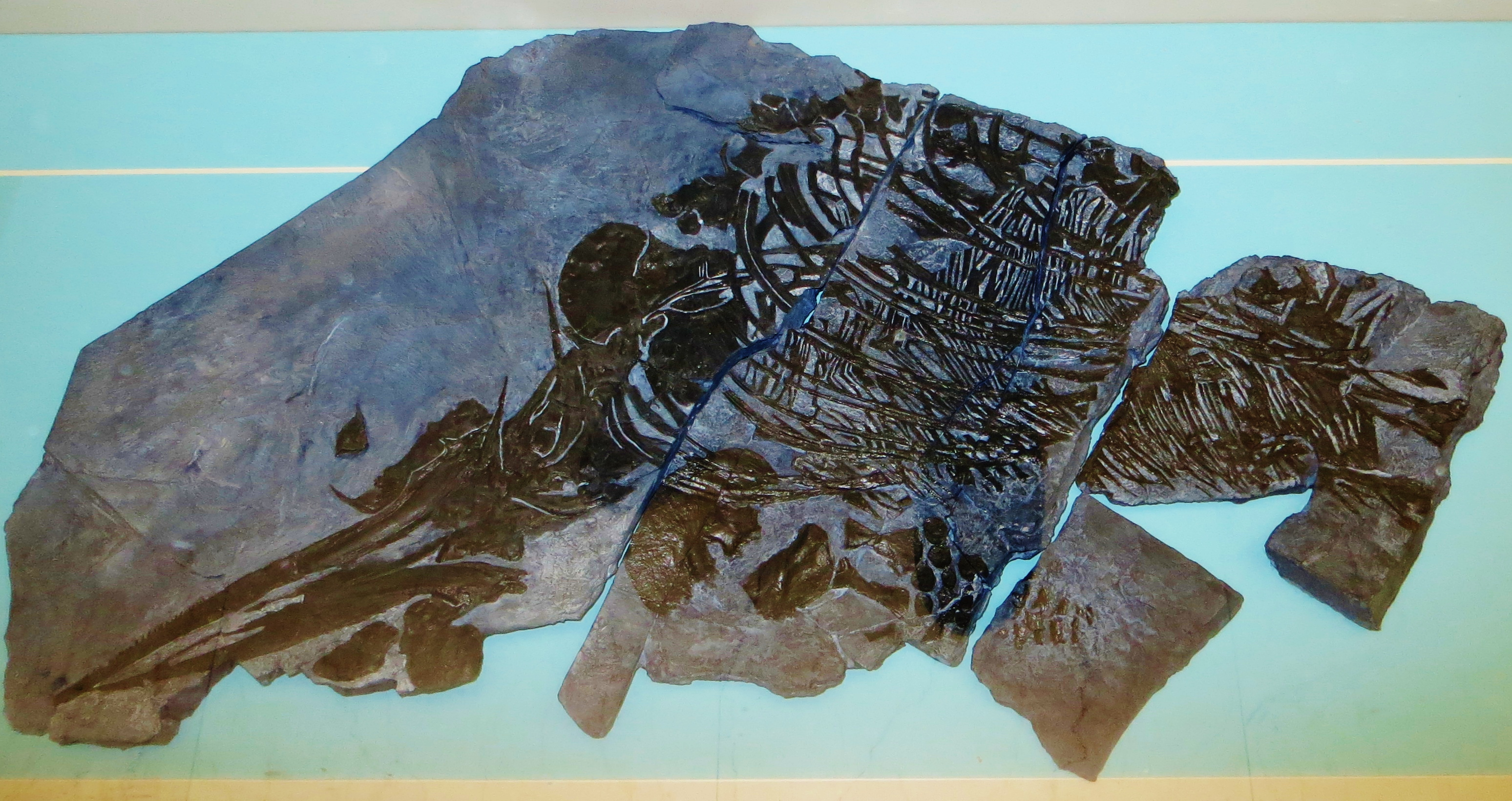 Fossil of Utatsusaurus- Took the picture at Museo di Storia Naturale, Milano